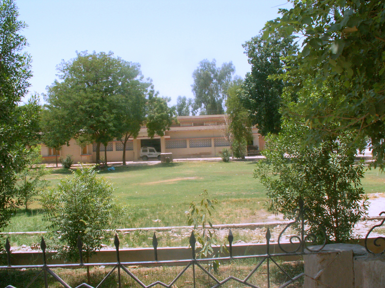 Allama I.I. Kazi Library Dadu